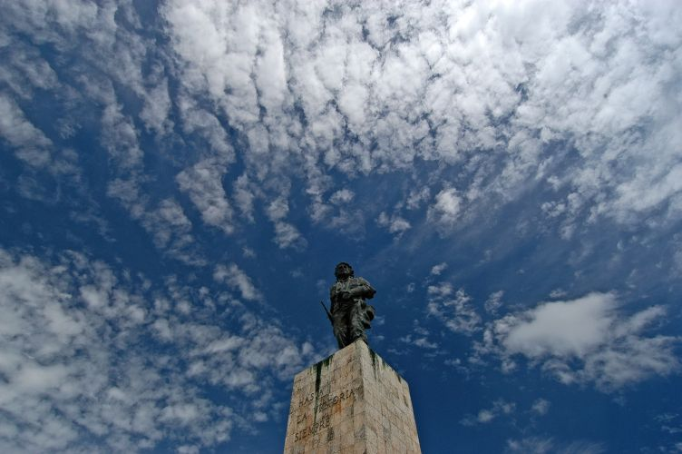 Cuba, september 2005, info in de Metadata. Eén van mijn zaligste foto's ooit. We waren speciaal omgereden om die uitzonderlijke ontmoeting te beleven: op een meter van Che Guevara staan. Hem voelen. En dan kom je uit de crypte, terug in de felle zon. Je neemt de camera en je focust op het standbeeld van Che. Ik zag dat de wolken zeer zachtjes als in een kroon om Che heen kwamen te liggen. Op tijd van enkele minuten was het zo ver. Alsof het zo moest zijn, als een heiligverklaring van Che. Voorbestemd. Magisch. De hele reeks zou hier niet misstaan.